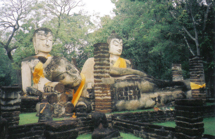 Wat Phra Keao in kamphaeng phet, Thailand